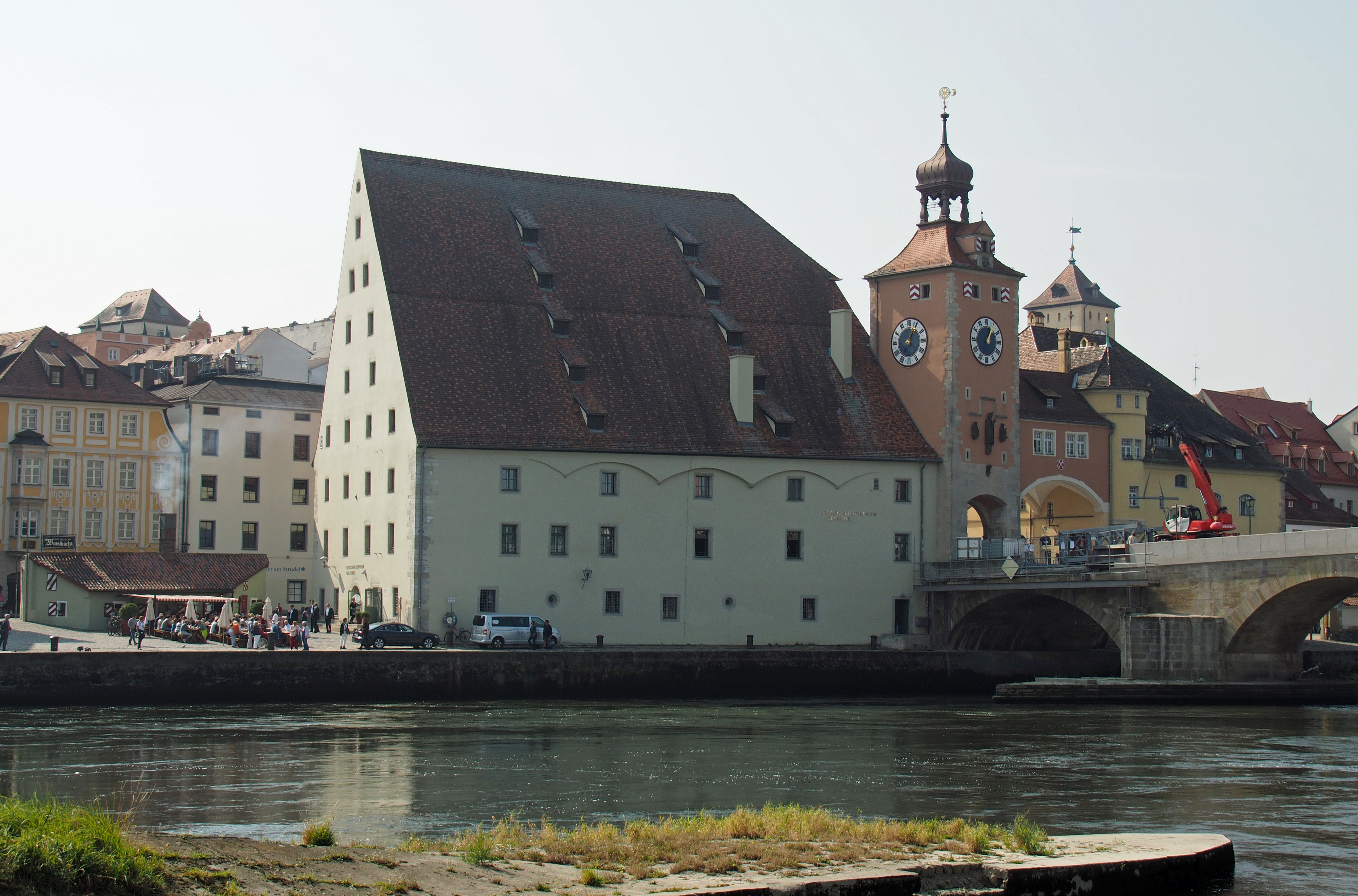 Ehemaliges Salzstadel in Regensburg, Sicht von der Jahninsel